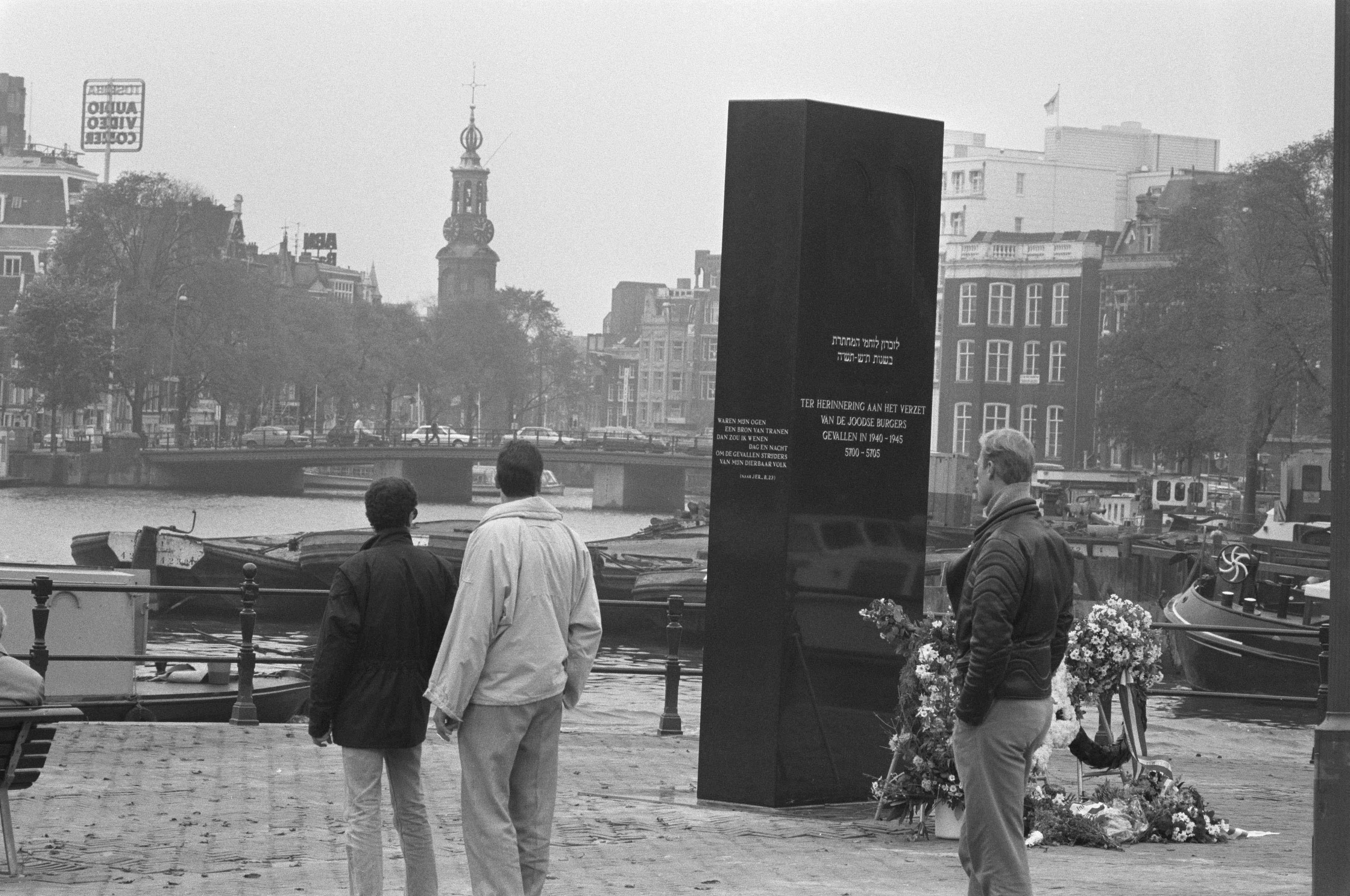 Collectie / Archief : Fotocollectie Anefo Reportage / Serie : [ onbekend ] Beschrijving : Monument voor Joods verzet in Amsterdam bij het nieuwe stadhuis Annotatie : Het monument Joods Verzet 1940-1945 is een ontwerp van J.J. Glatt, de uitvoering is van ir. Emmanuel M. Glatt Datum : 17 oktober 1988 Locatie : Amsterdam, Noord-Holland Trefwoorden : oorlogsmonumenten Fotograaf : Bogaerts, Rob / Anefo, [onbekend] Auteursrechthebbende : Nationaal Archief Materiaalsoort : Negatief (zwart/wit) Nummer archiefinventaris : bekijk toegang 2.24.01.05 Bestanddeelnummer : 934-3403